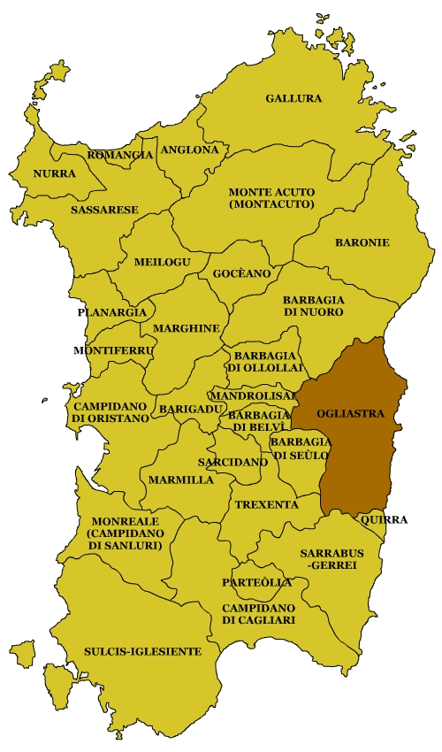 Sardinian Subregions